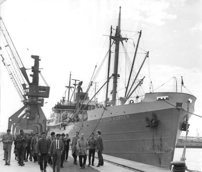 Rostock, Überseehafen, Lehrschiff Zentralbild Link 8.10.1965 DDR: Rostock-Woche der Deutsch-Lateinamerikanischen Freundschaft (25.9. bis 2.10.1965) Eine Woche der Deutsch-Lateinamerikanischen Freundschaft in der DDR fand vom 25.9. bis 2.10.1965 in Rostock statt. Zahlreiche Persönlichkeiten wie der Romancier Mighel Angel Asturias, der Lyriker Roque Dalten (El Salvador), mehr als 100 Studenten aus zwölf Ländern Mittel- und Südamerikas und weitere Gäste nahmen an den Veranstaltungen zur Woche der Deutsch-Lateinamerikanischen Freundschaft teil. UBz: Studenten aus Lateinamerikanischen Ländern, die in der DDR studieren, nahmen an einer Führung durch den Rostocker Überseehafen teil. Rechts: Das Lehr- und Frachtschiff "Theodor Körner".